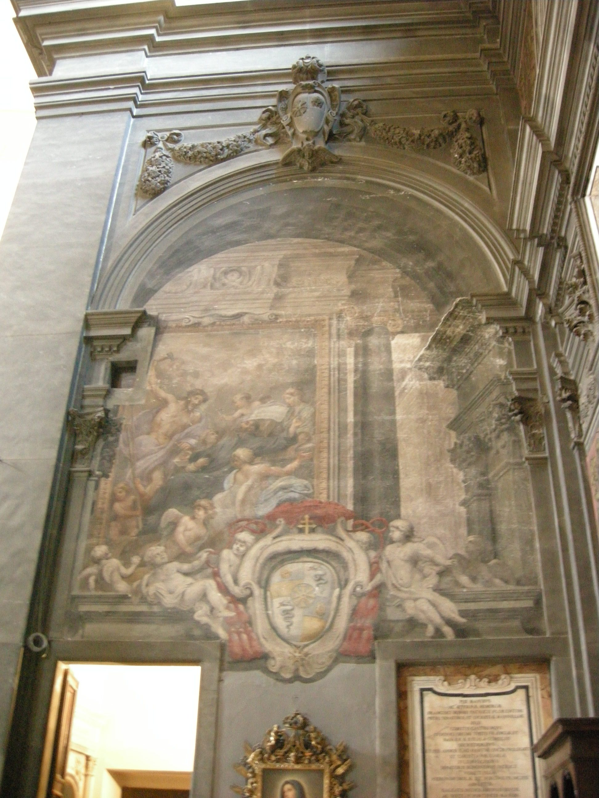 San gaetano, transetto sx, San Gaetano riceve i segni della Passione di Gesù di Jacopo Chiavistelli (1671)